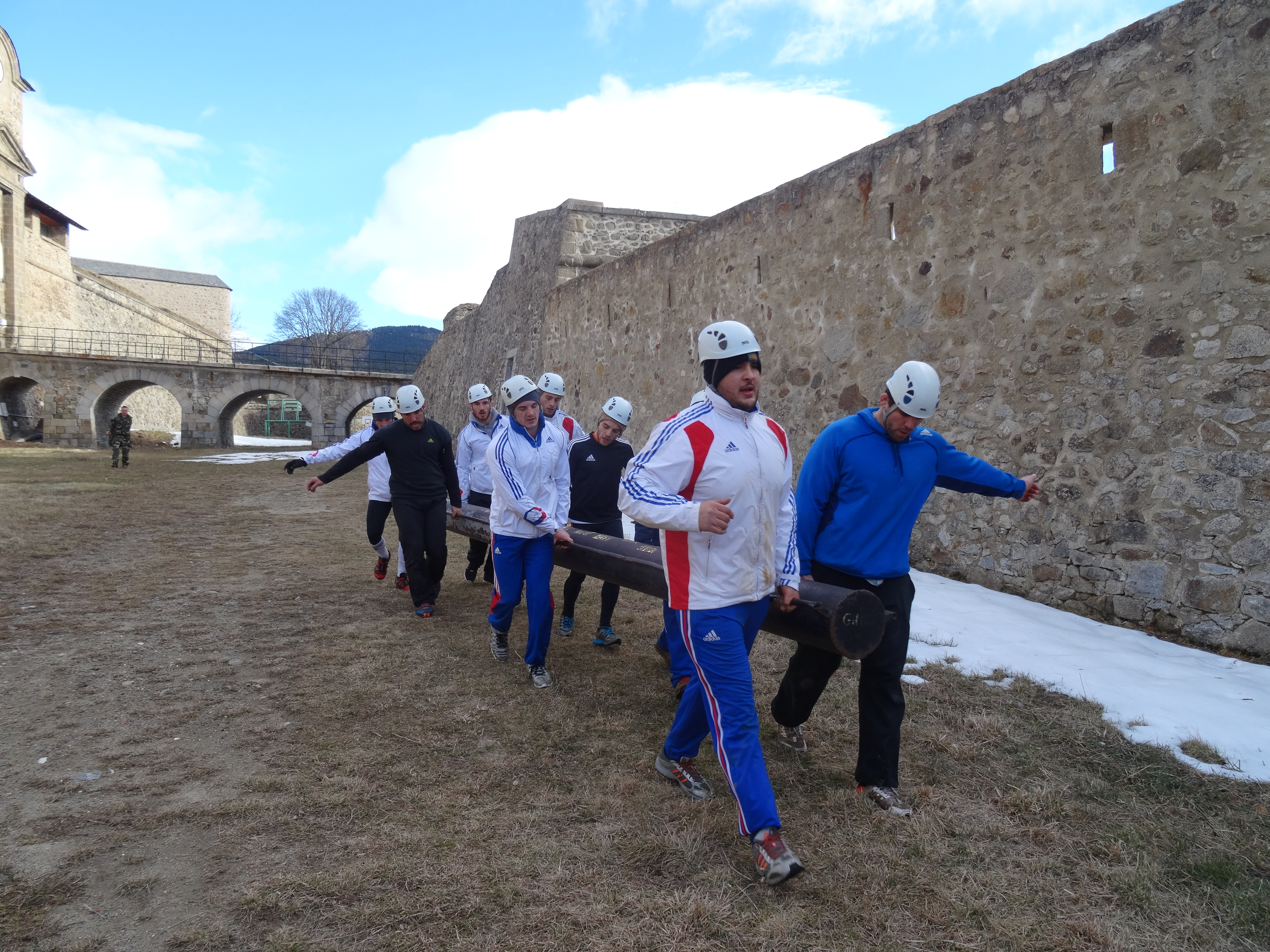 Entraînement de l'Equipe de France de Judo à Font-Romeu. Team Building avec le CNEC.